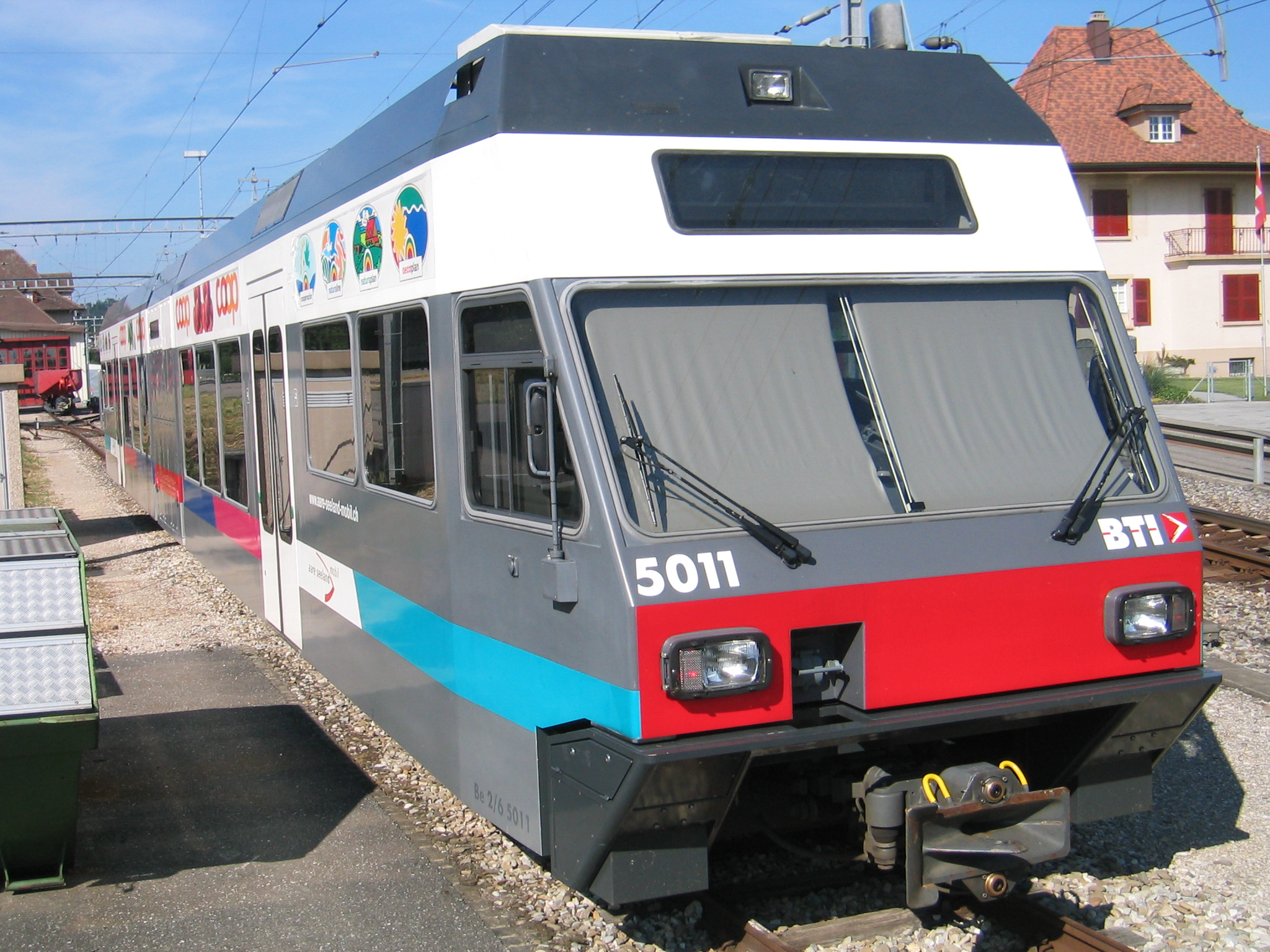 Aare Seeland mobil (ASm), ehemals Biel-Täufelen-Ins-Bahn (BTI), Be 2/6 501 in Täuffelen (Schweiz). Der allererste GTW "Gelenktriebwagen" der Firma Stadler, Inbetriebsetzung Mai 1997